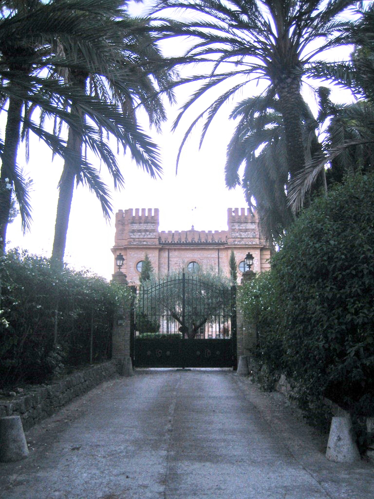 Puerta principal al Castillo-Masía de San Fernando en Campolivar.